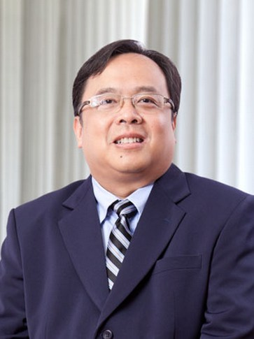 Bambang Brodjonegoro, Wakil Menteri Keuangan